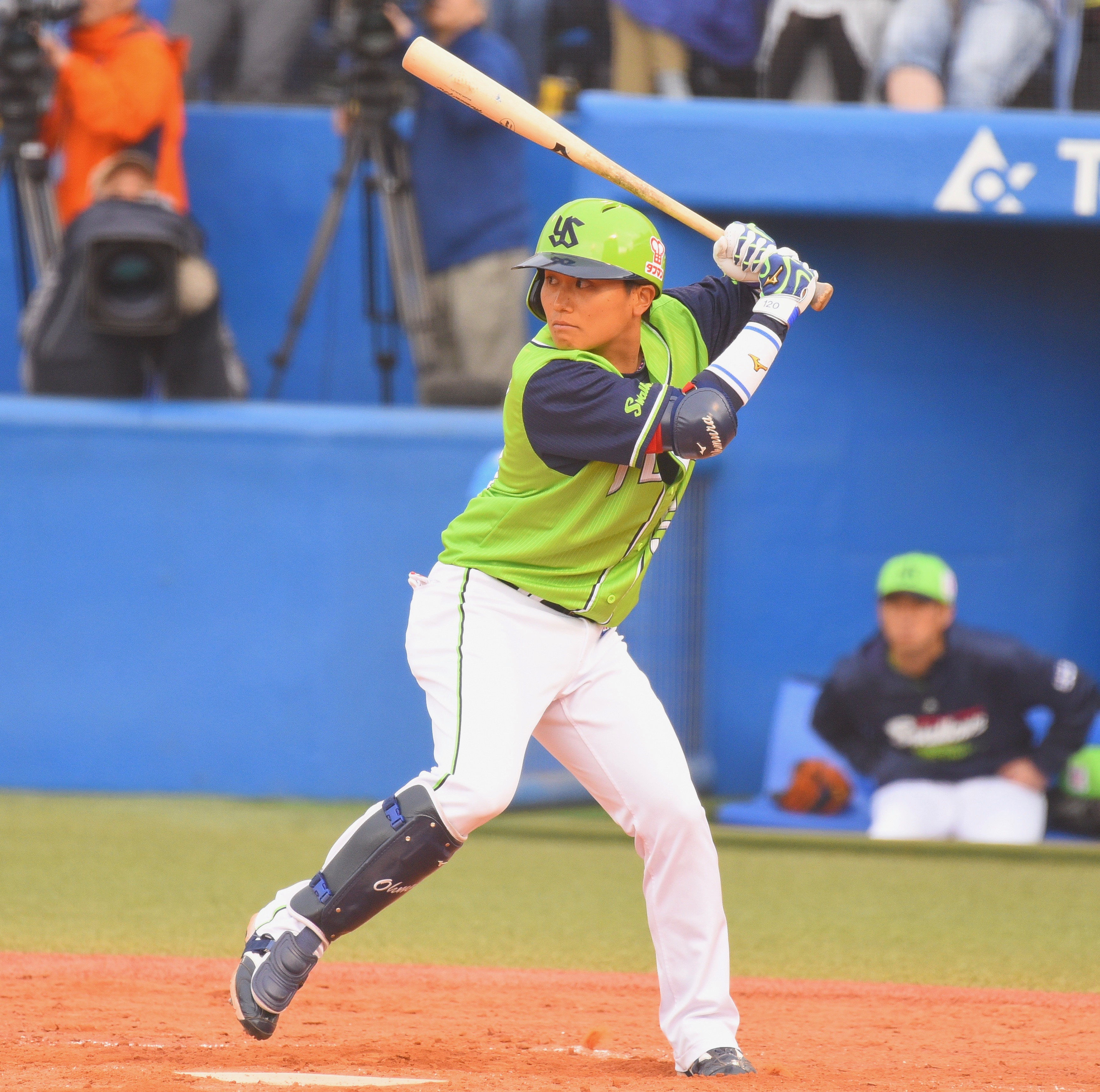 東京ヤクルトスワローズ 大村孟 2018年4月7日 神宮球場